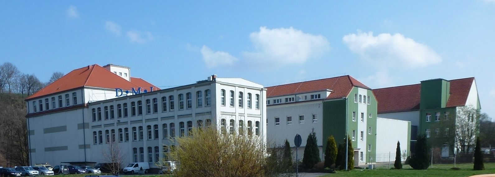 DMI in Leisnig